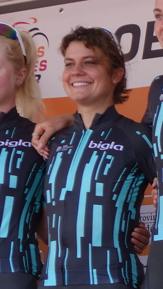 Leah Thomas (Bigla) bij de start van de eerste etappe van Stramproy naar Weert in de Boels Ladies Tour 2019